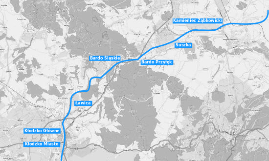 Mapa linii kolejowej Kamieniec Ząbkowicki - Kłodzko